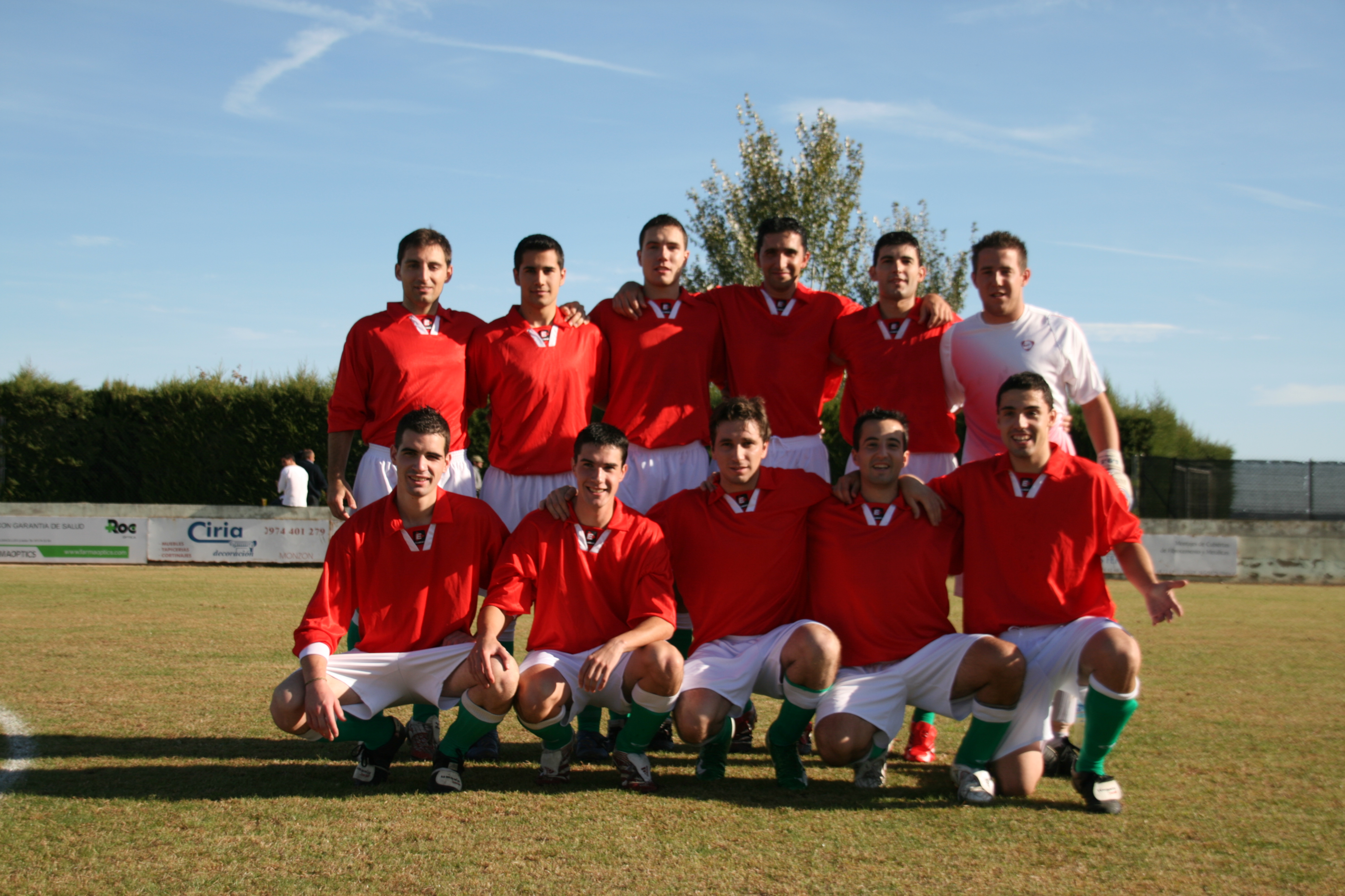 Altorricón 2 - Biescas 1 (05102008)